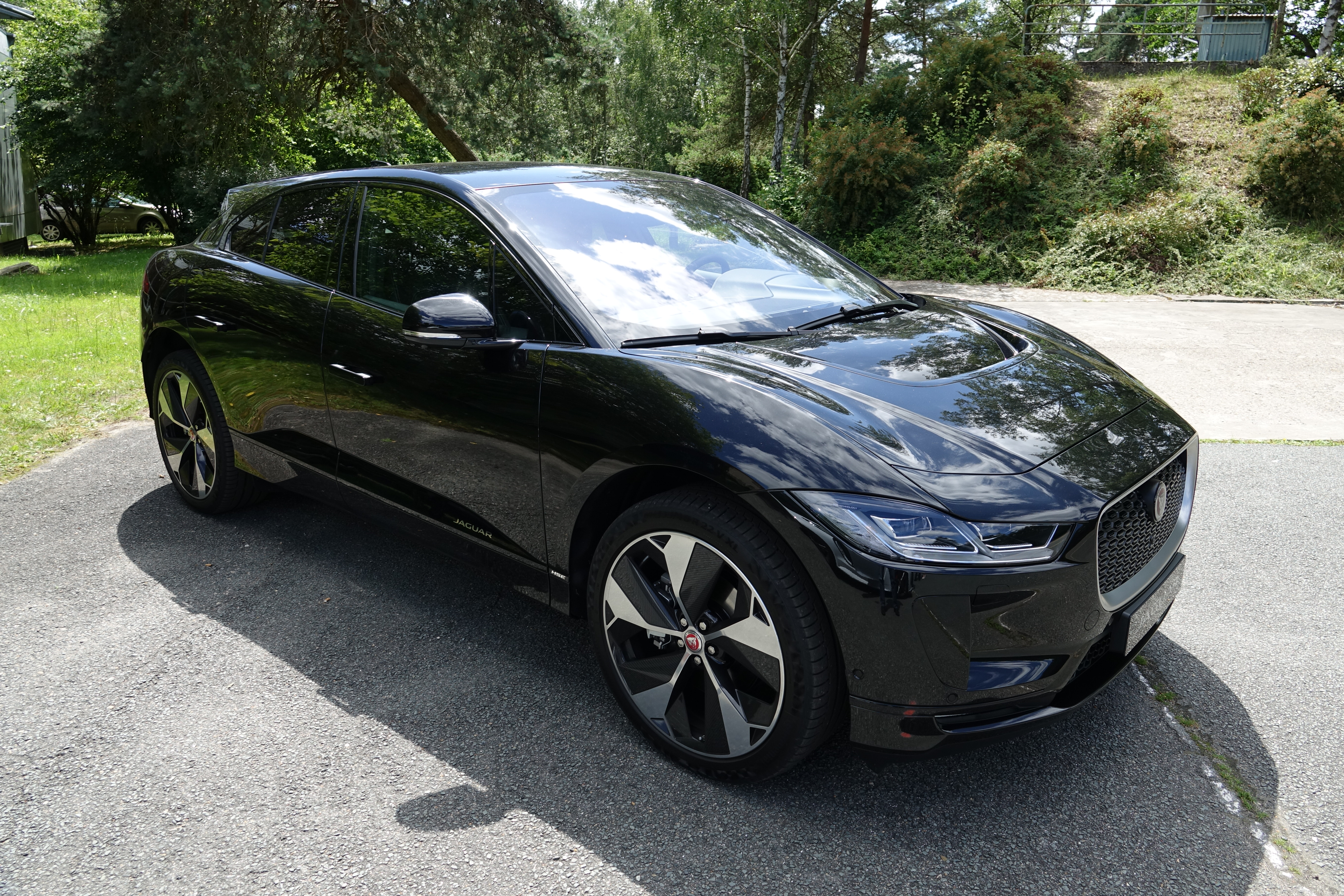 Jaguar I-Pace à Mortefontaine